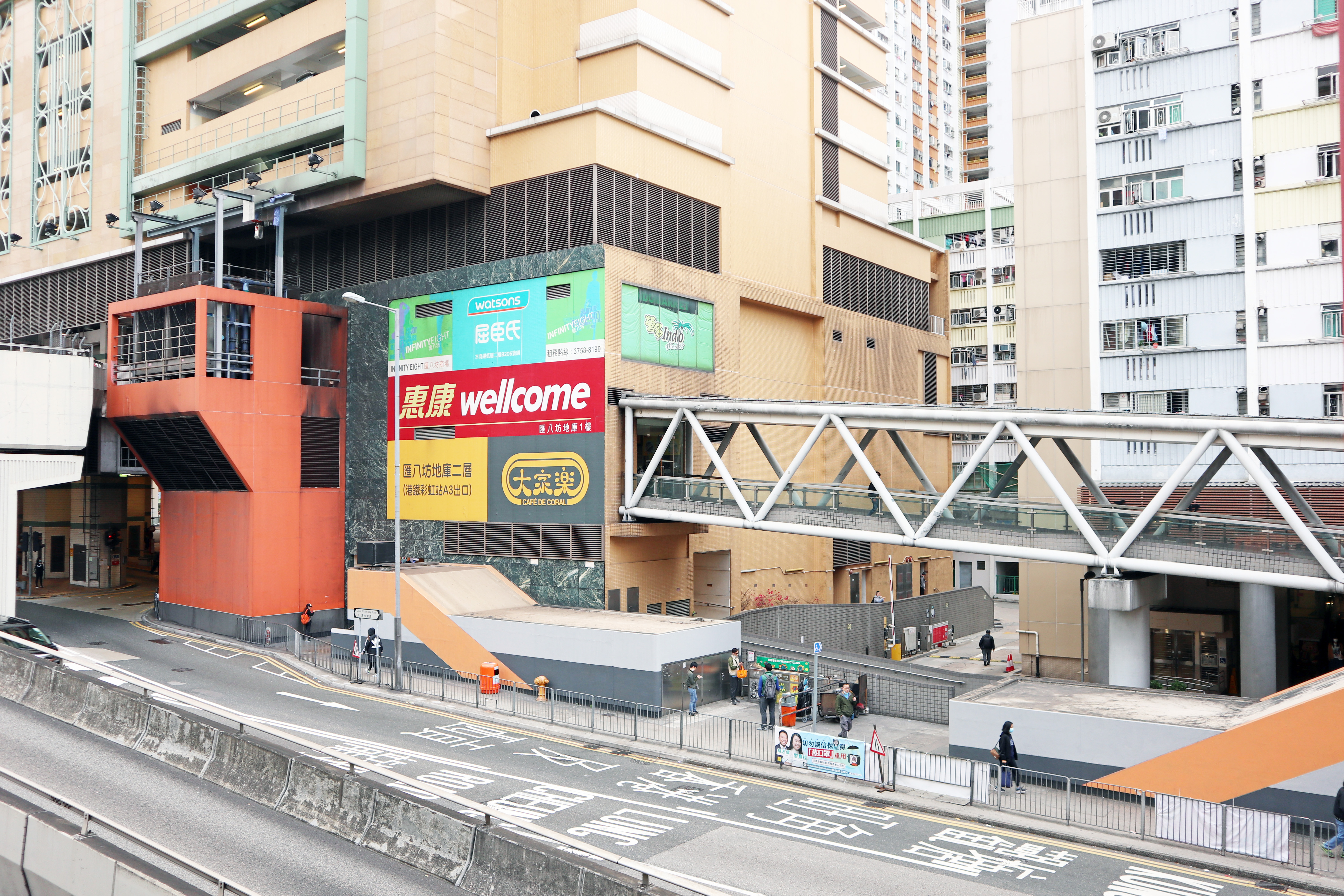 港鐵彩虹站A1及A2出入口外觀